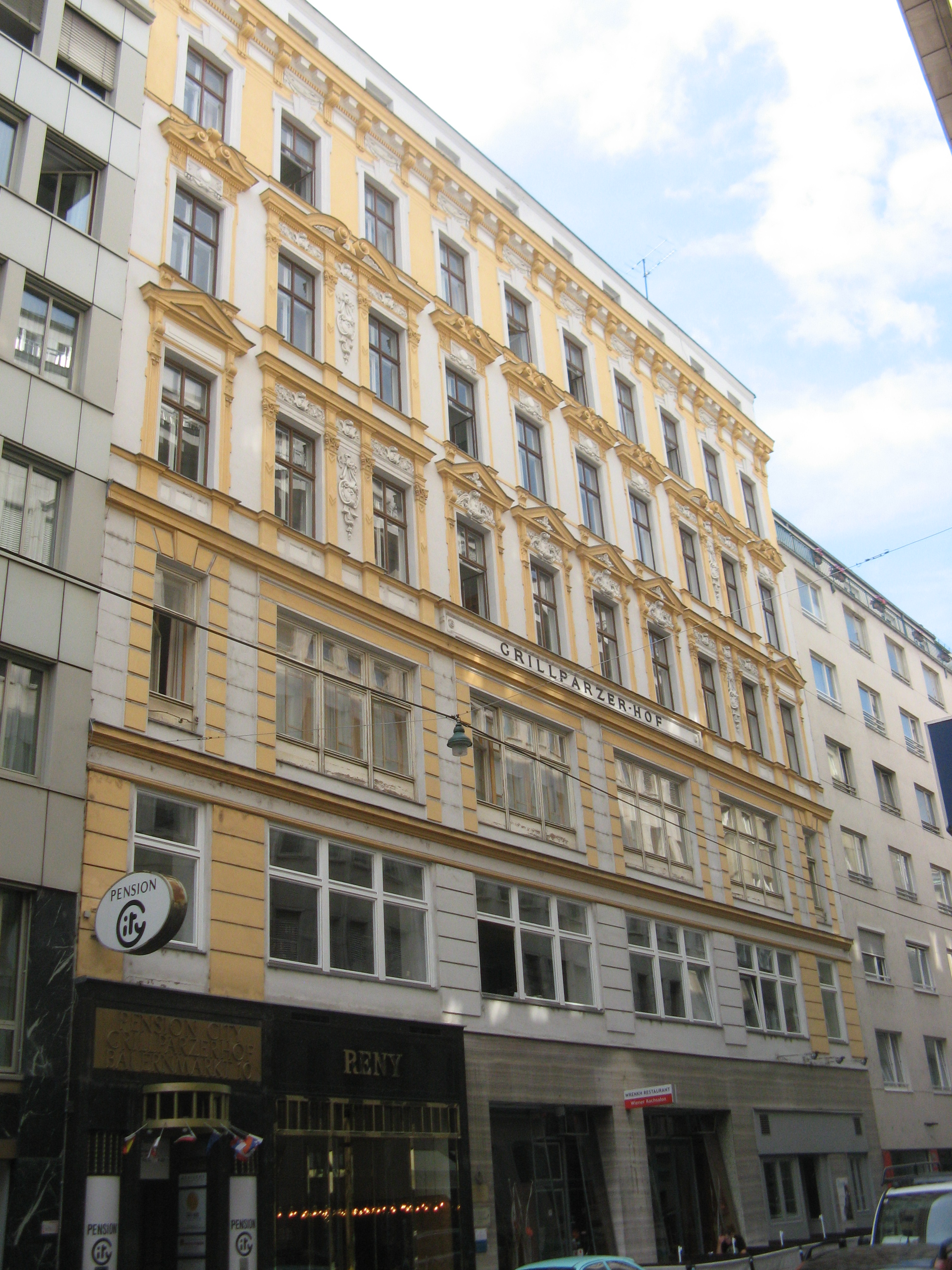 Grillparzerhof (1894/95) von M. Löw, Bauernmarkt 10, Wien-Innere Stadt